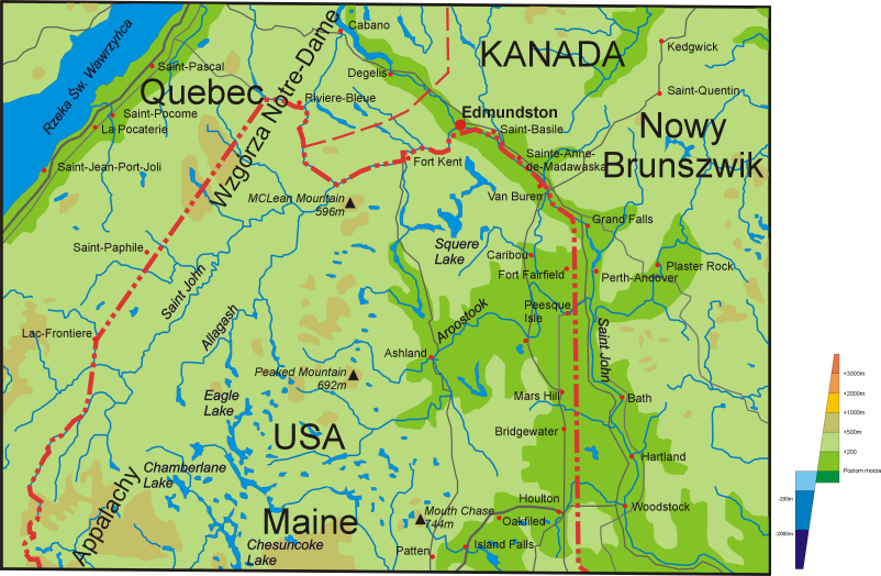 Region Madawaska, autor mapy: Paweł Wajda, 2004